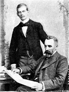 James Tarbotton Armstrong (1848/1849-1933) och Axel Orling (1870-?)